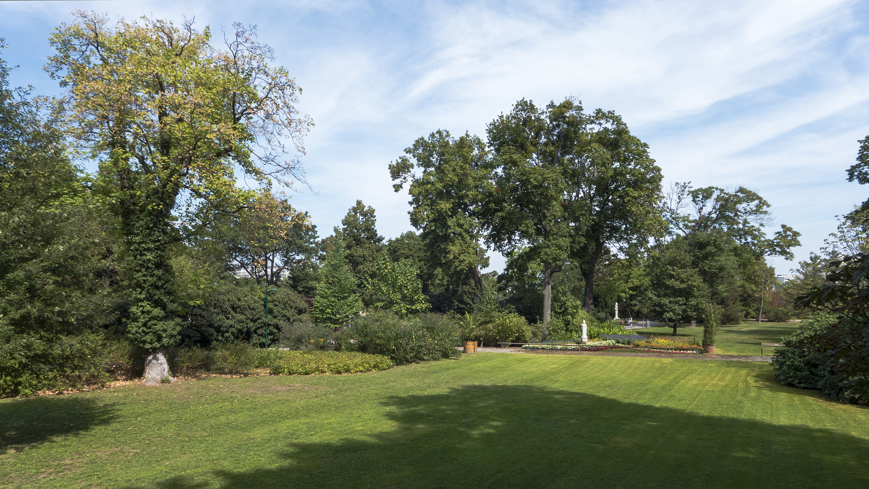 Wertheimsteinpark in Wien 19